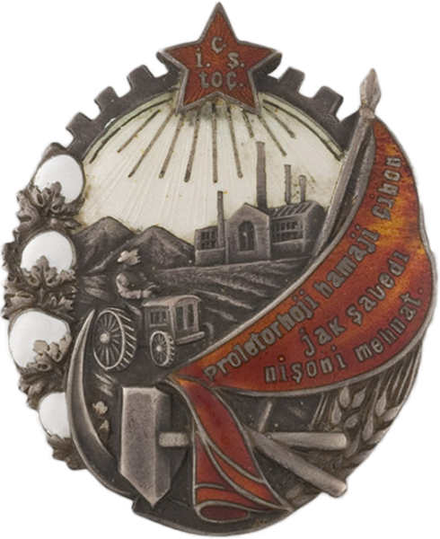 Орден Трудового Красного Знамени Таджикской ССР